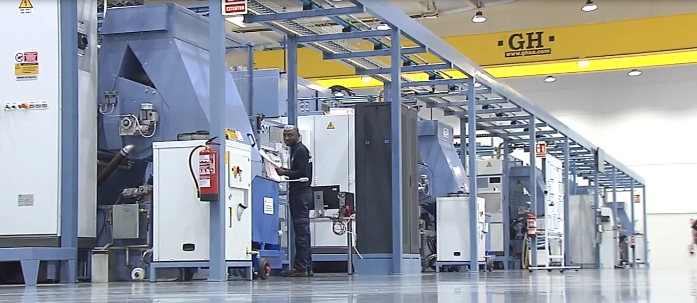 Visita a Aciturri y Montefibre (Miranda de Ebro).